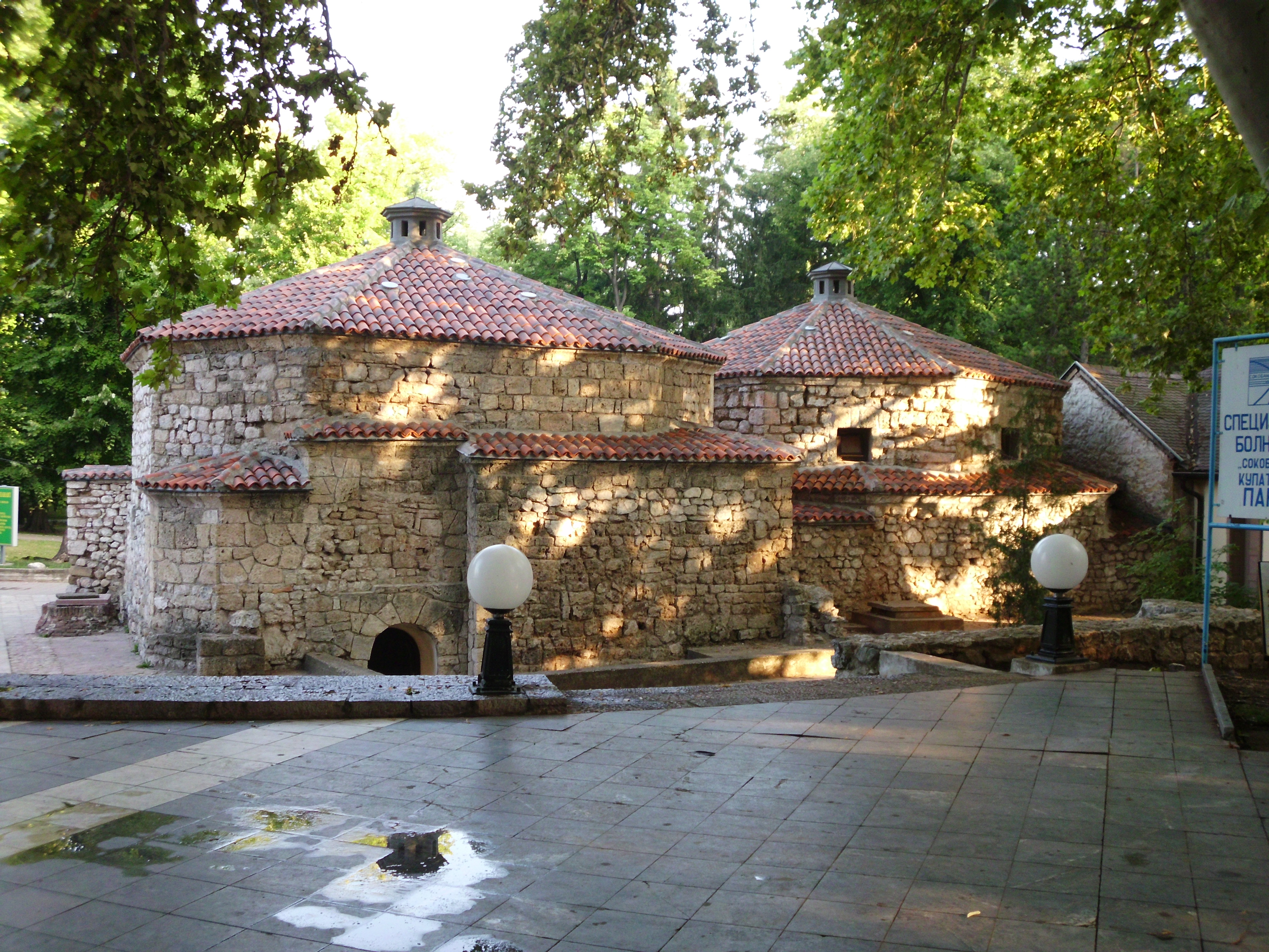 Hamam u sokobanji prvi put se pominje u istorijskim izvorina u 17.veku.Nalazi se u centru Soko banje